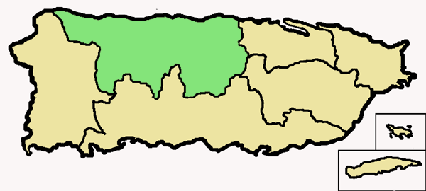 Mappa della diocesi cattolica di Arecibo, a Puerto Rico. Anno 2009.